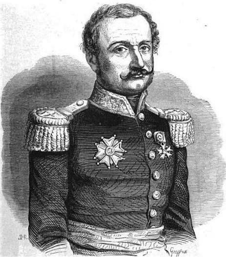 Le général Oudinot.